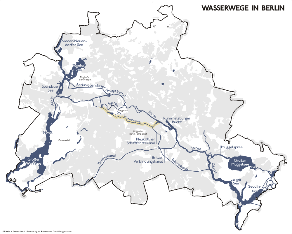 Landwehrkanal Berlin